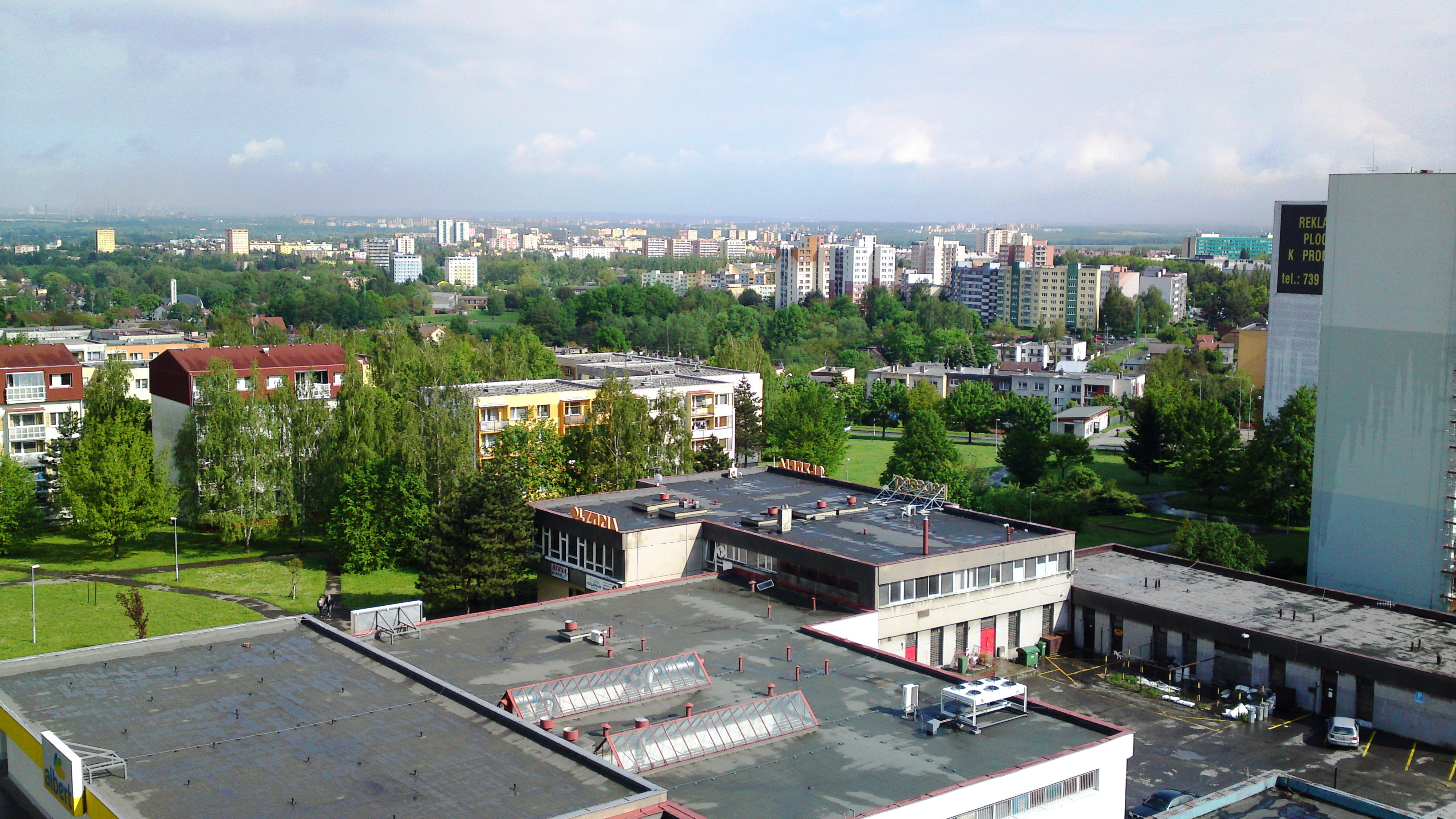 Ostrava Poruba